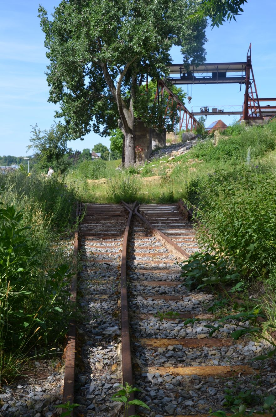 Gleisanschluss der Fa. Schauffele an die Industriebahn Münster–Cannstatt. Links der Beginn der Steilrampe zur Haldenstraße, rechts der Anschluss zur Verladeanlage des Steinbruchbetriebs Schauffele.